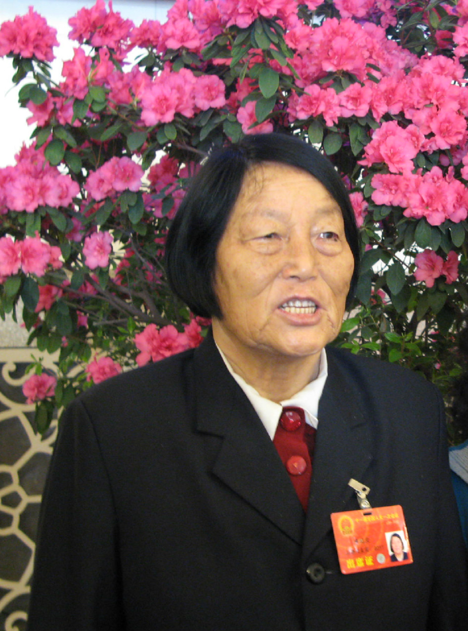 任期最长、从来只投赞成票的人大代表申纪兰（左）2012年参加人大会议时的合影照。（美国之音张楠拍摄）